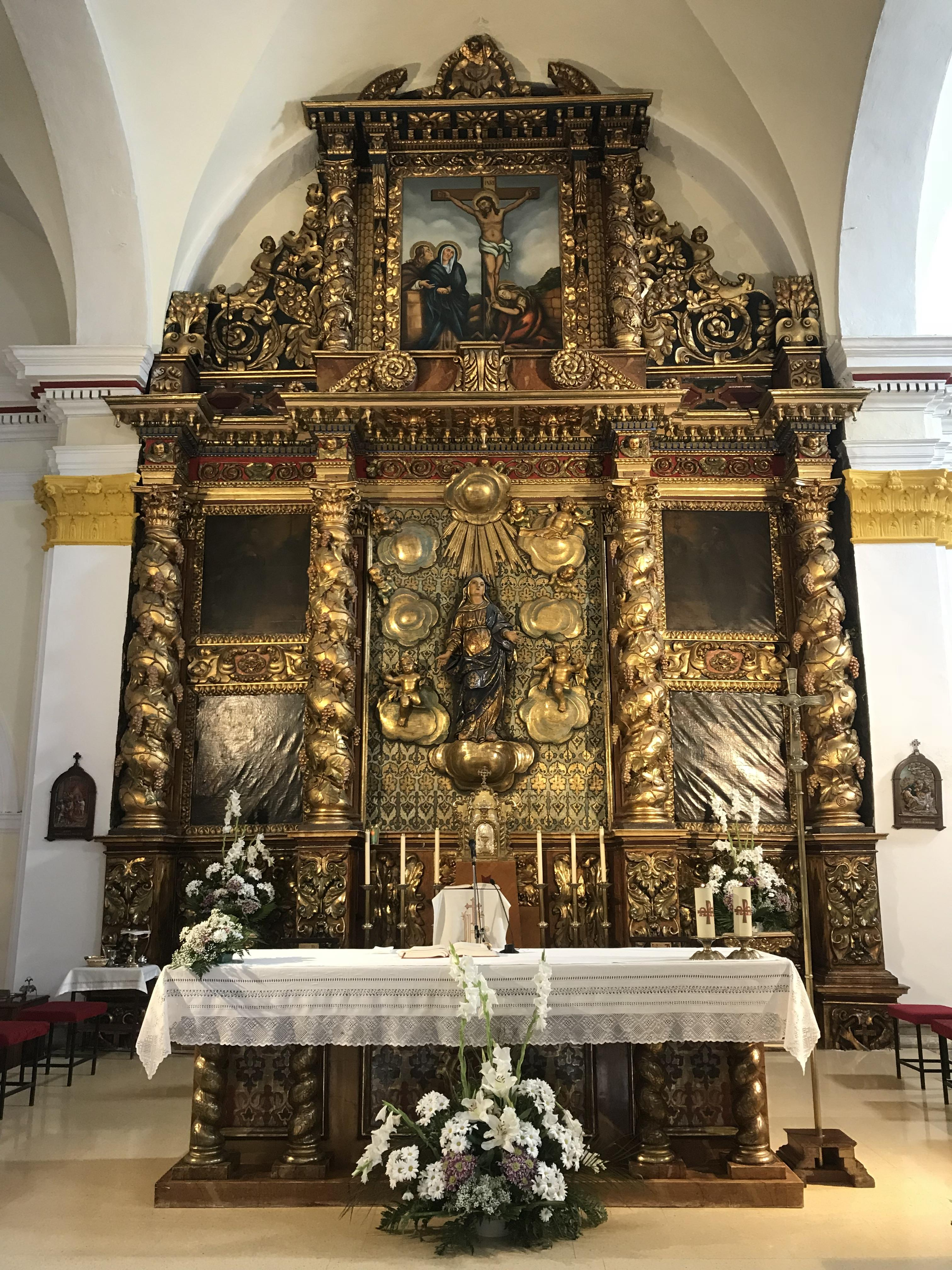 Retablo mayor iglesia de Ntra. Sra. de la Esperanza, Novillas (Zaragoza)